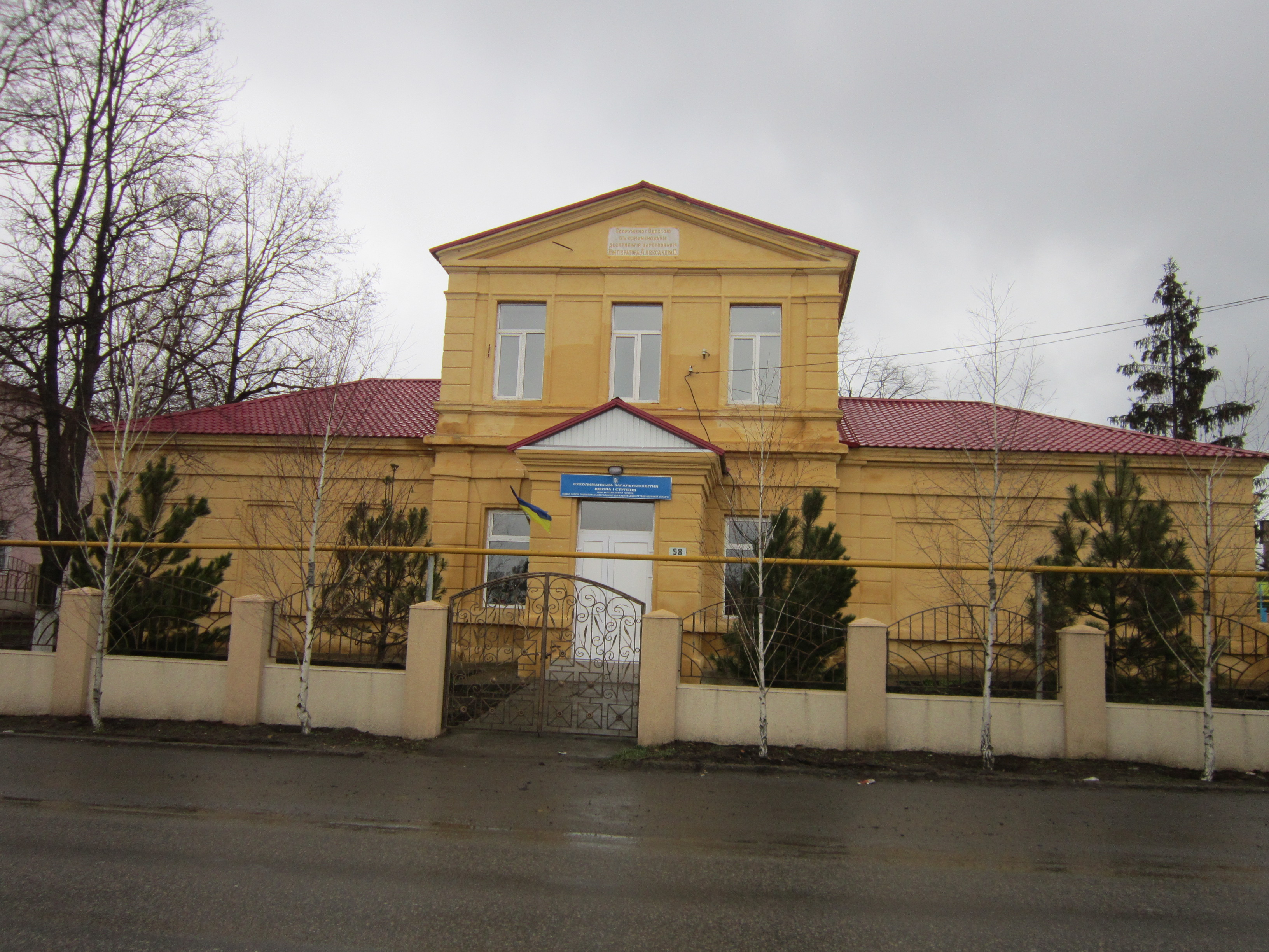 Будівля початкового народного училища, с. Сухий Лиман